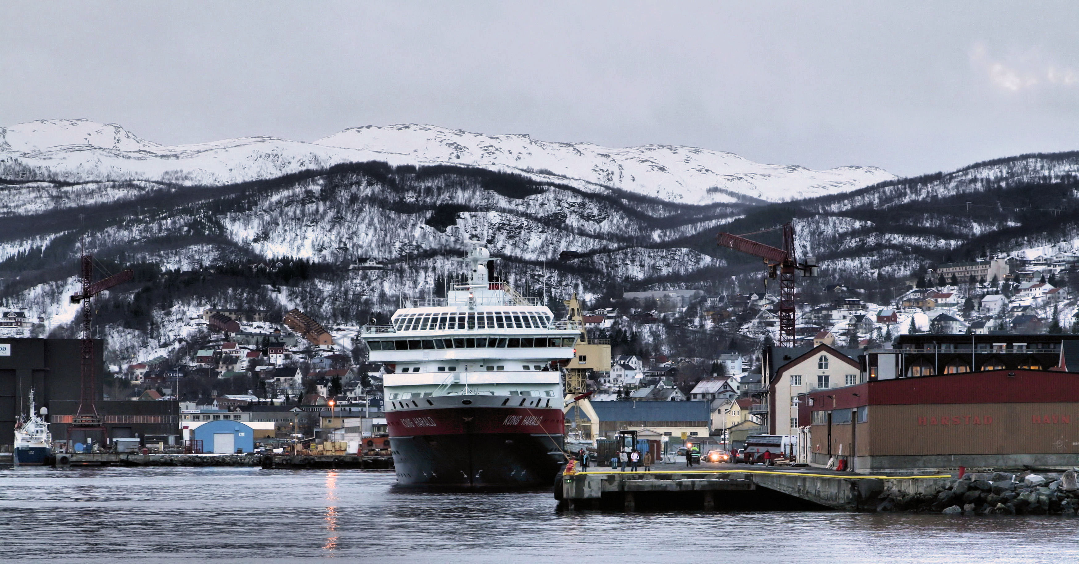 Hurtigruten M/S Kong Harald in Harstad harbour, Norway. Winter 2005-2006